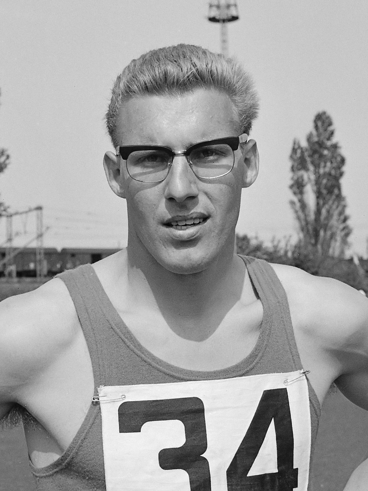 Internationale atletiekwedstrijden, Evers (verspringen) 31 mei 1964